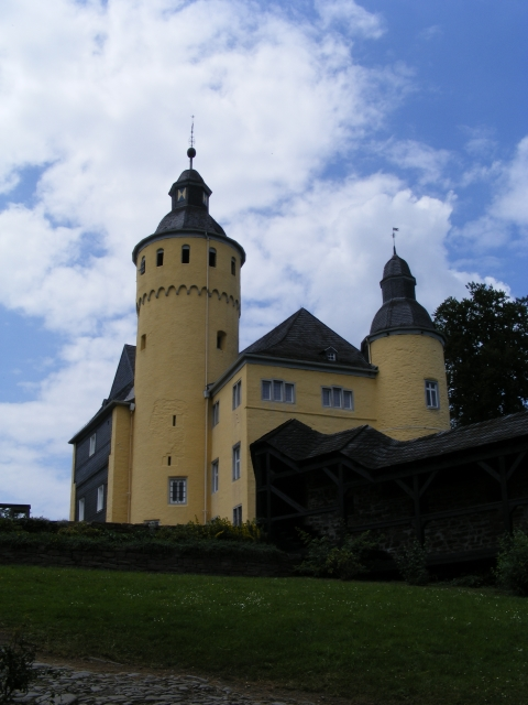 Schloss Homburg in Nümbrecht